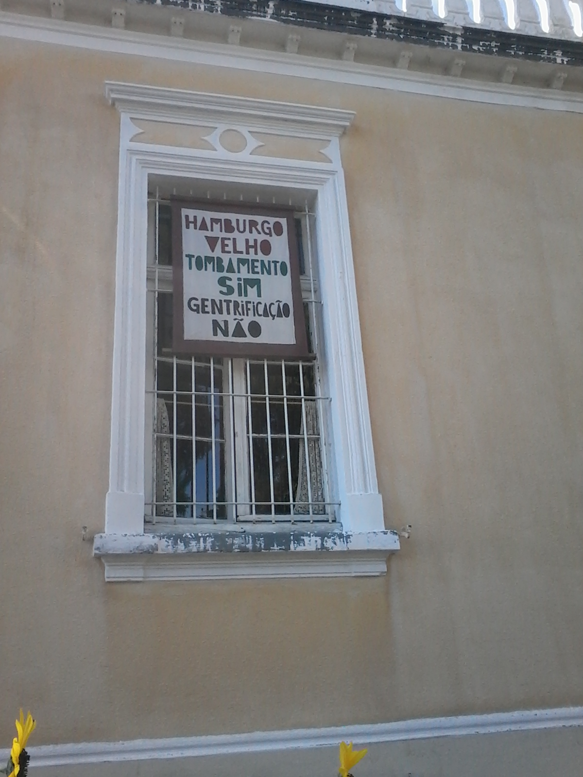 Cartaz em Novo Hamburgo (RS) protestando contra a gentrificação do bairro Hamburgo Velho.